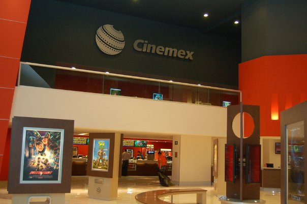 Nuevo Concepto de Cinemex